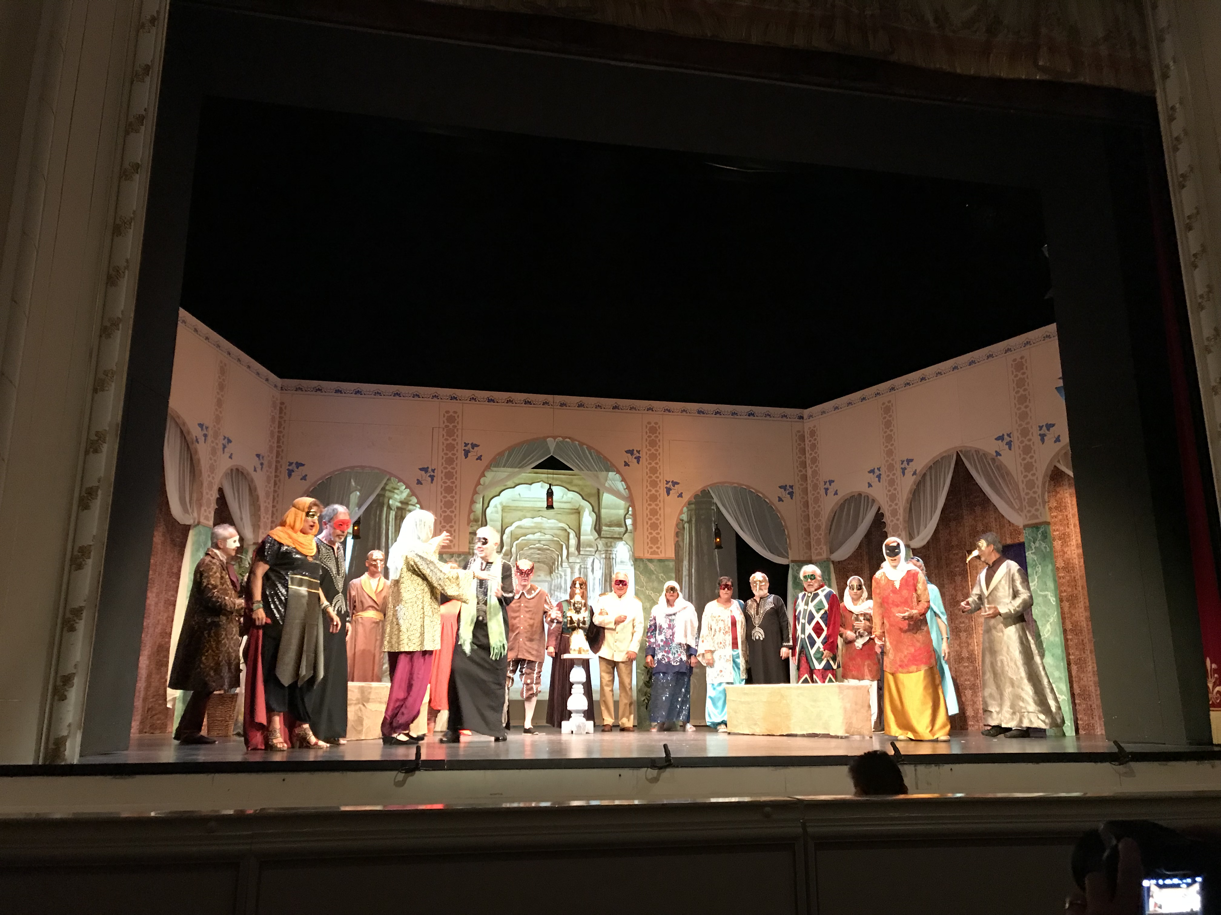 Bilder von der Generalprobe der Neuburger Kammeroper vom 20. Juli 2018. Intendanz: Horst Vladar.